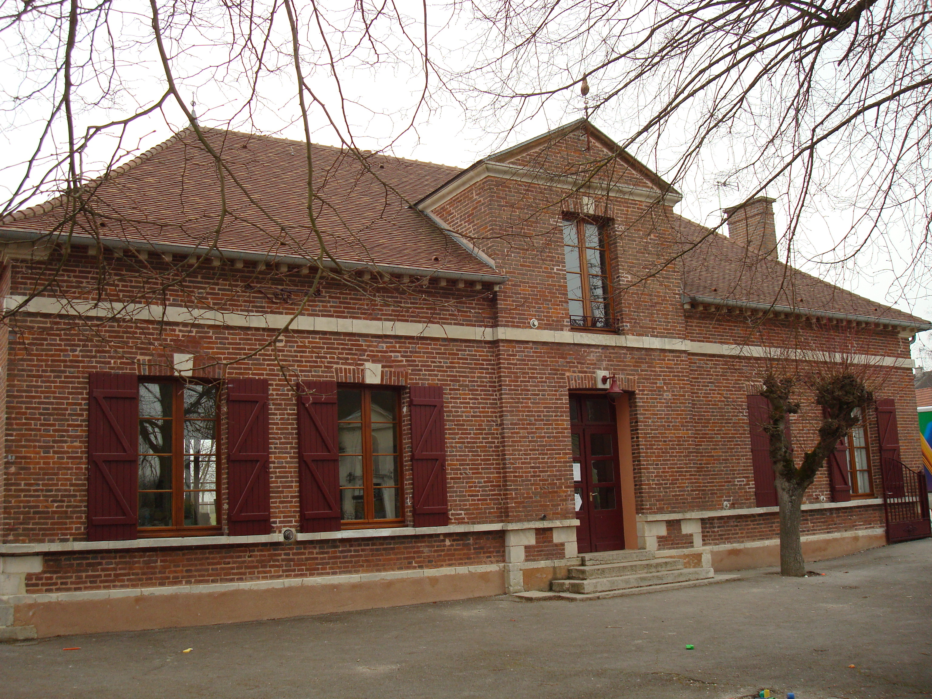 Chauchigny